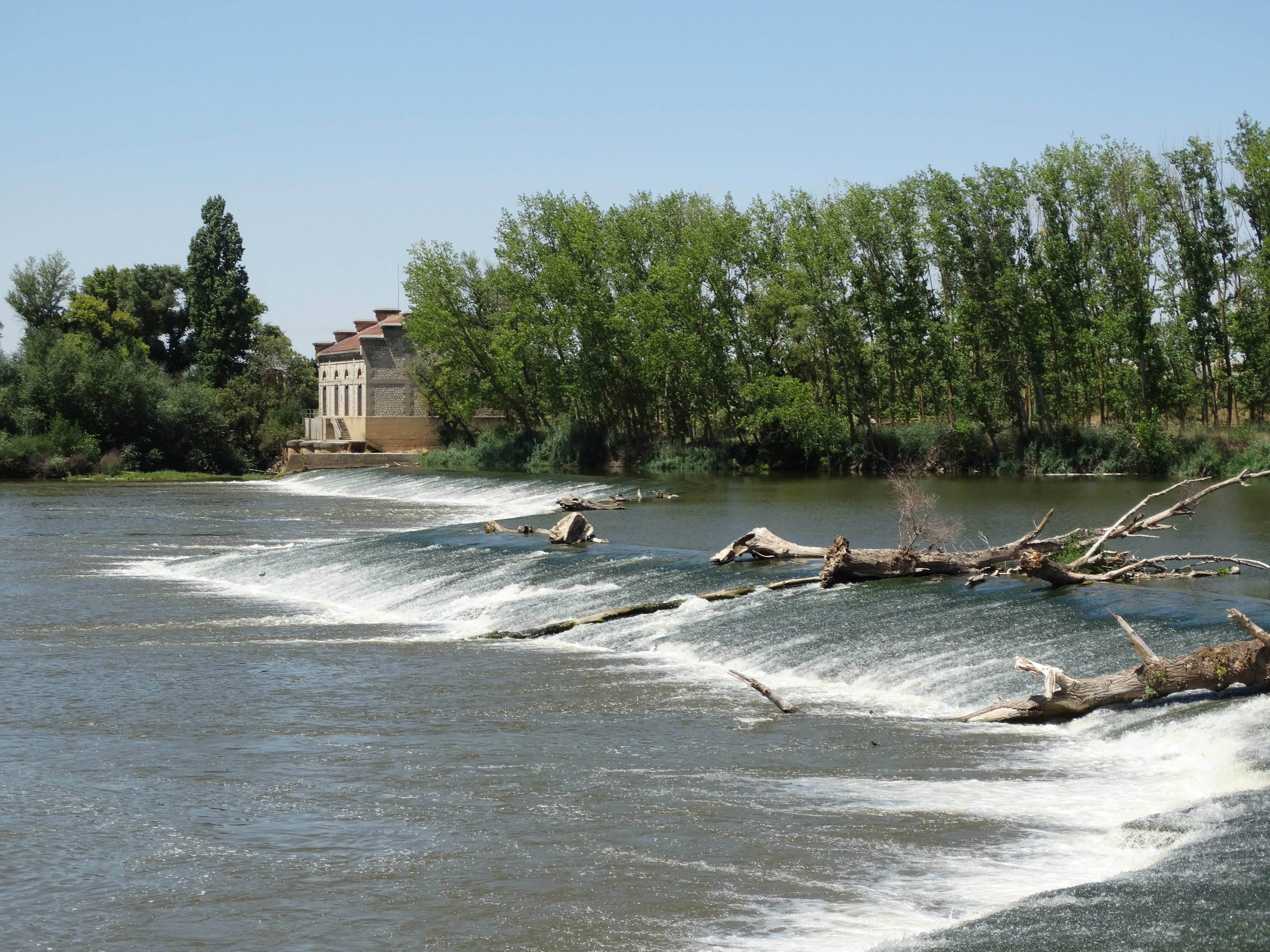 Pesquera en el río Duero que fue propiedad de los monjes de Aniago, actual despoblado en la provincia de Valladolid (España).